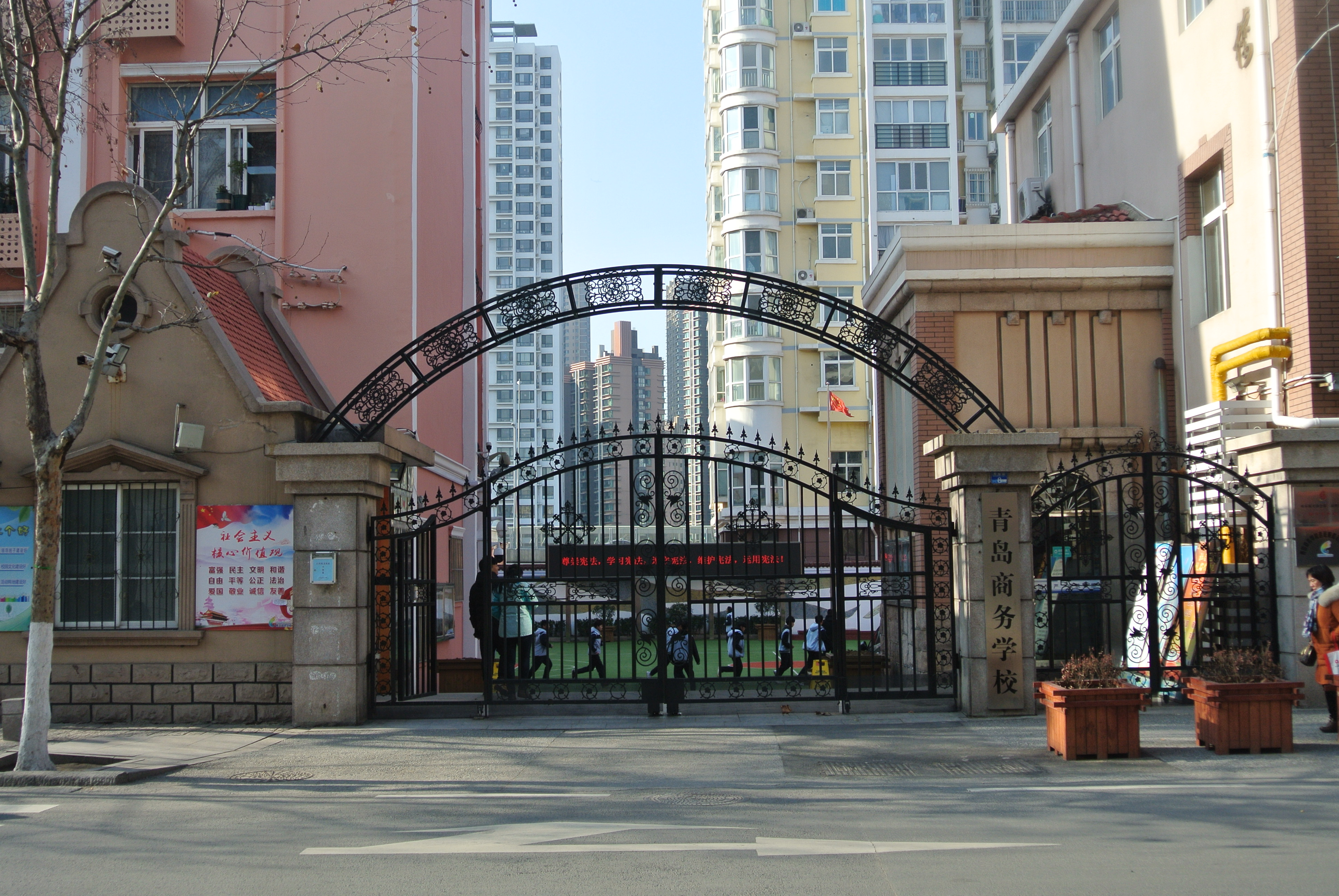 青岛商务学校馆陶路校区正门